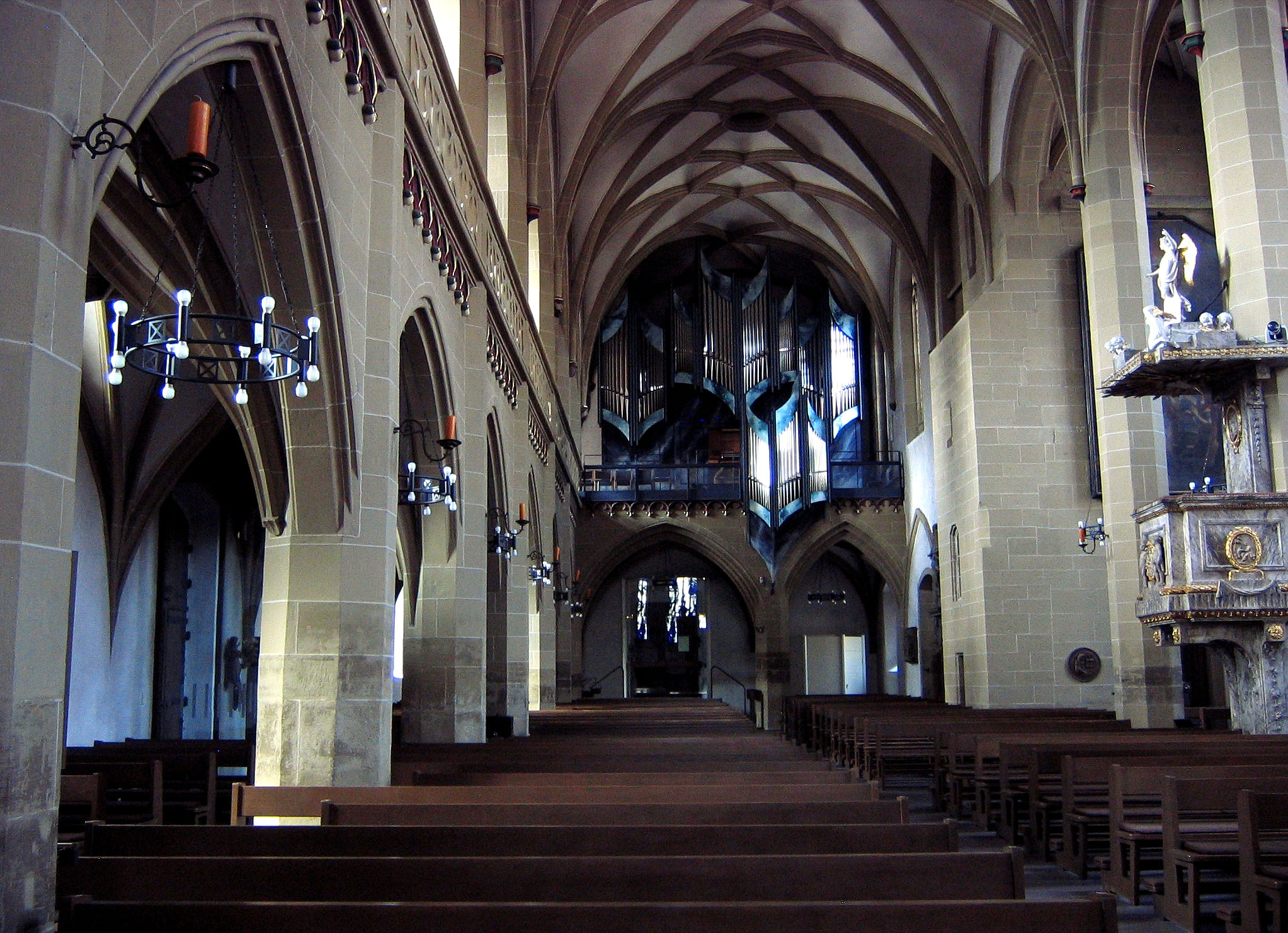 Innenansicht der St.Johanneskirche in Kitzingen